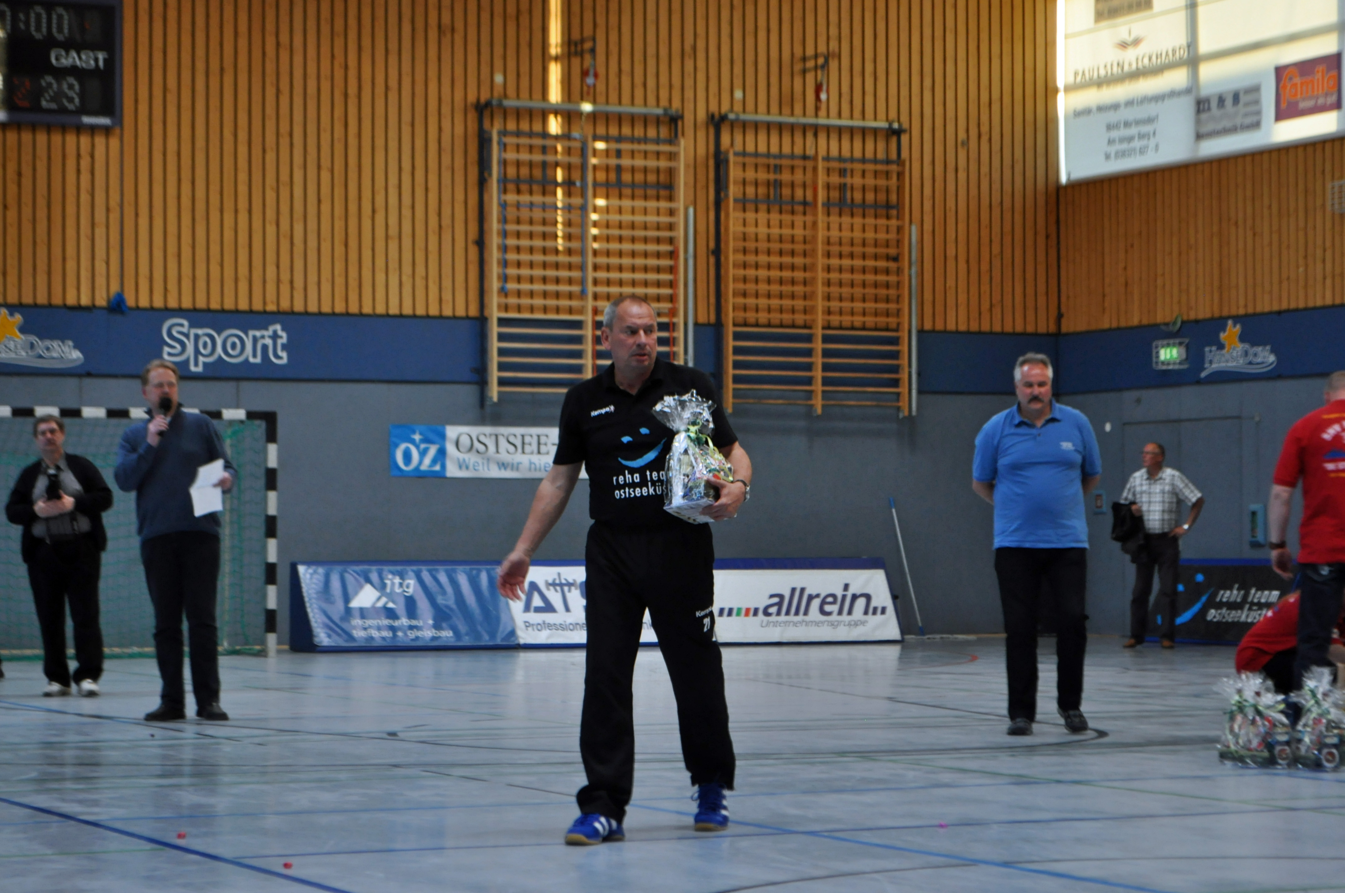 Die erste Männer-Mannschaft des Stralsunder HV nach dem Punktspiel am 26.4.2014 gegen den Lausitzer HC in der Vogelsanghalle Stralsund. Durch den 37:28-Sieg wurde das Team Meister der Oberliga Ostsee-Spree und steht als Aufsteiger in die 3. Liga (DHB) fest. Im Bild Trainer Norbert Henke.